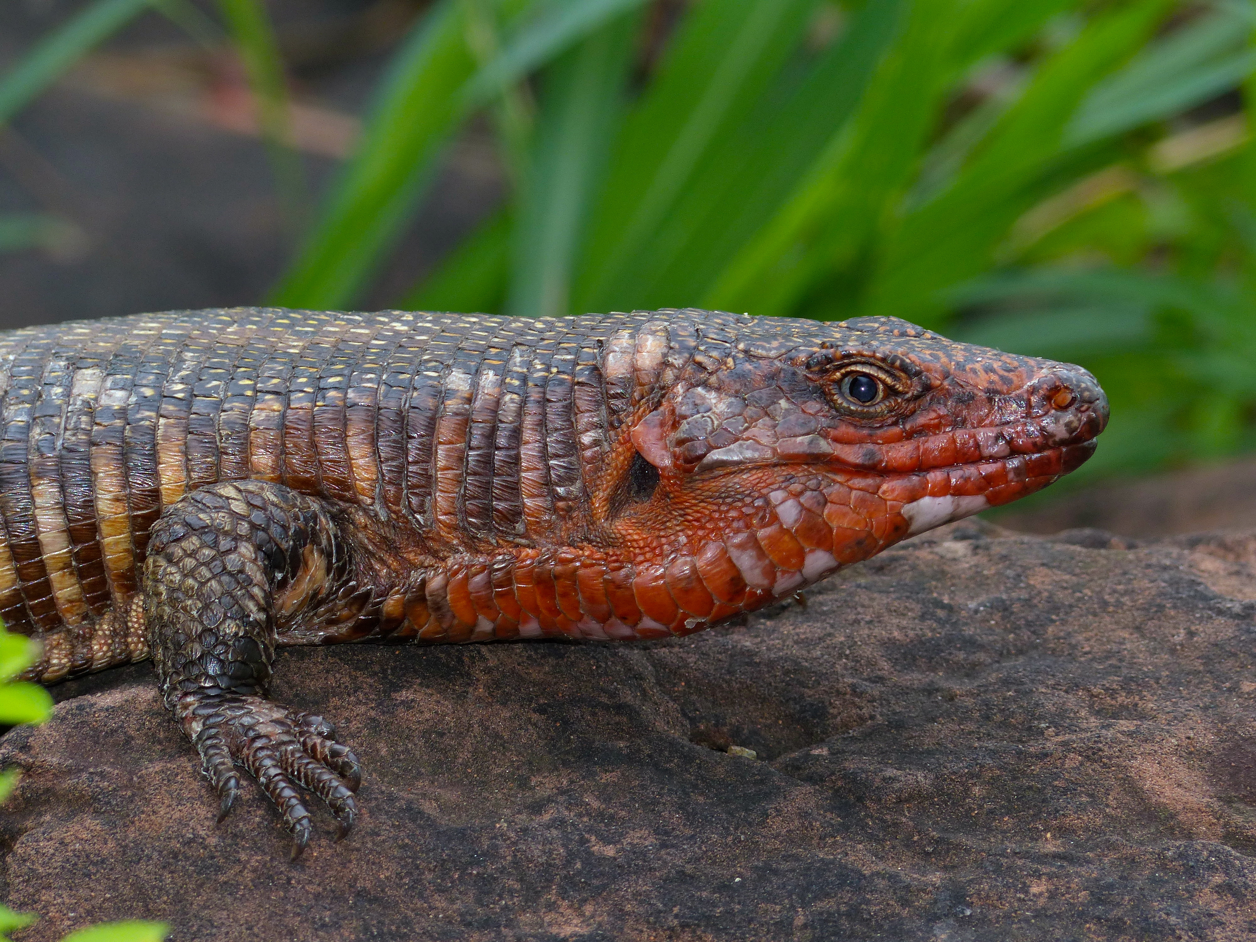 Bungalow N°51, Mopani Camp, Kruger NP, SOUTH AFRICA